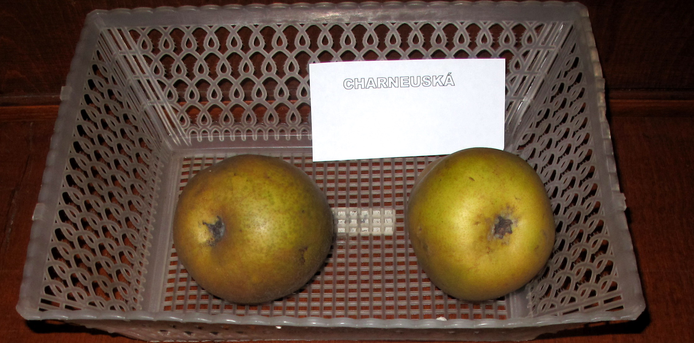 Charneuská